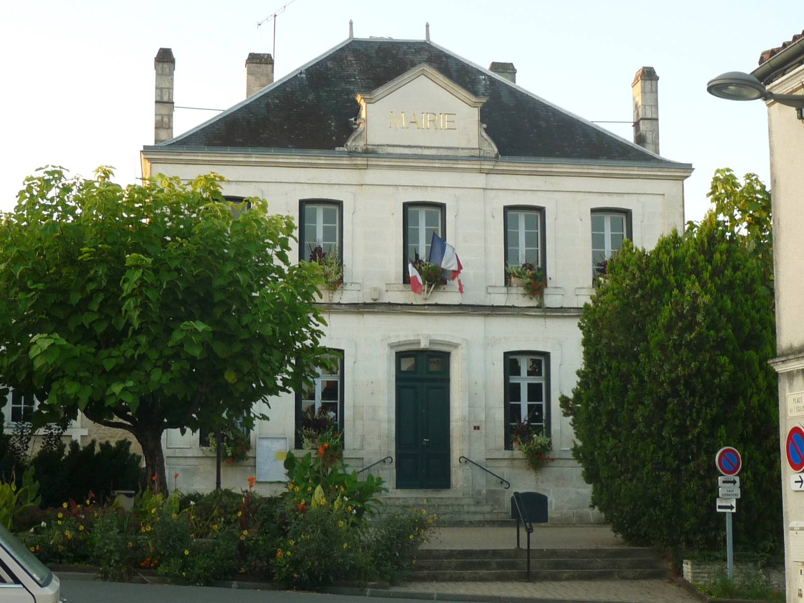 mairie de Champniers (16), France